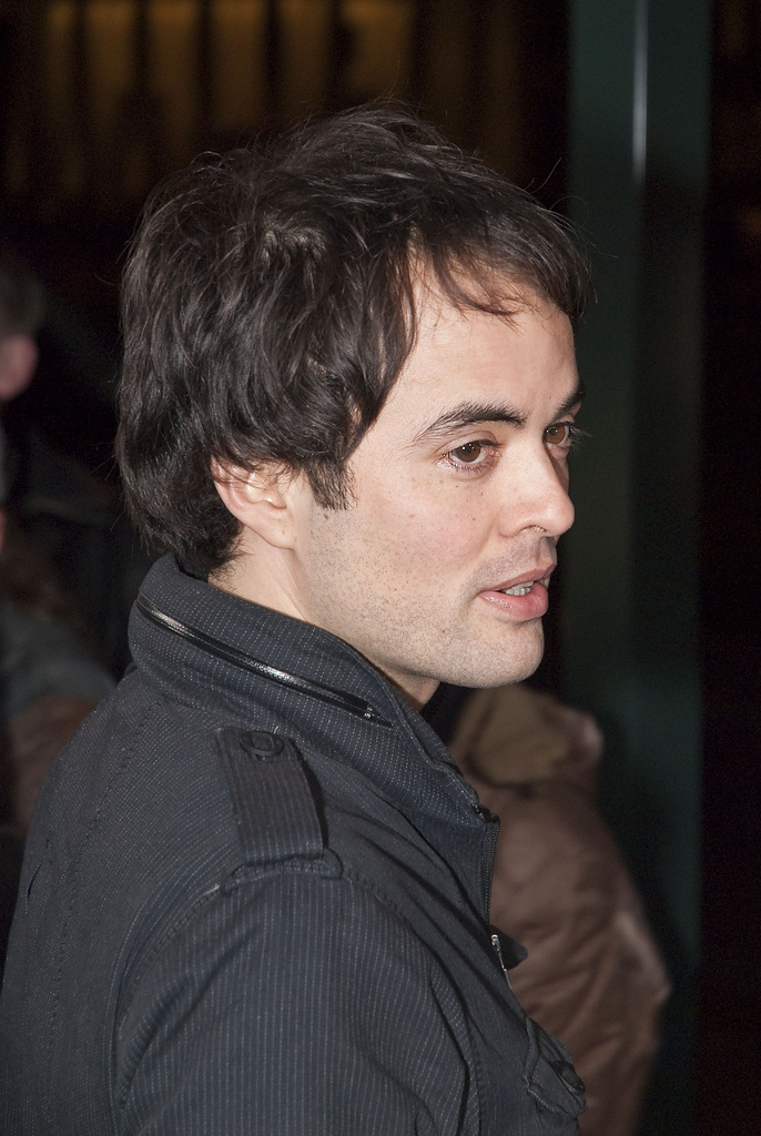 Nikolai Kinski, actor, son of Klaus Kinski Volkswagen People’s Night 2008